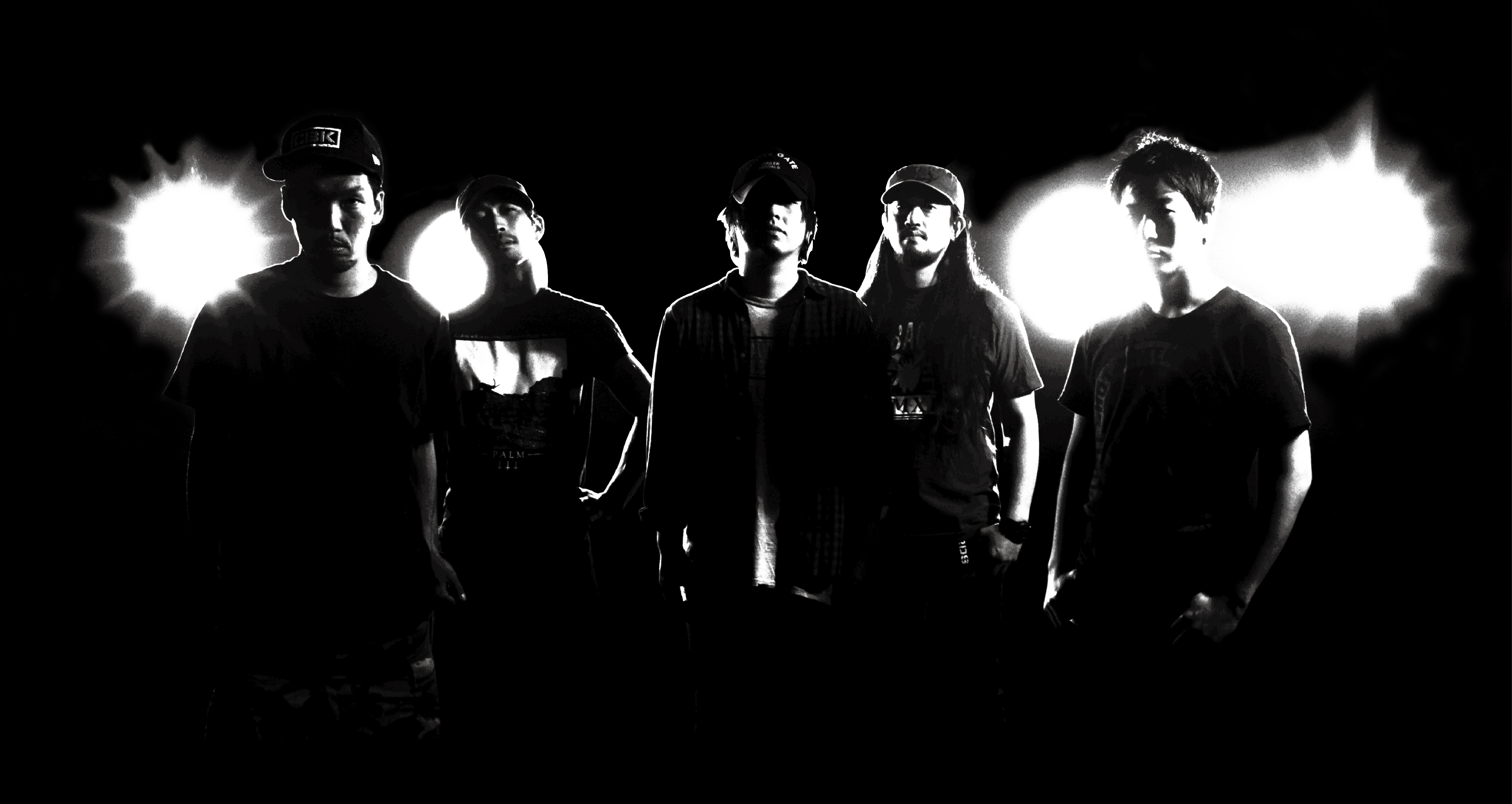 The Coastguards